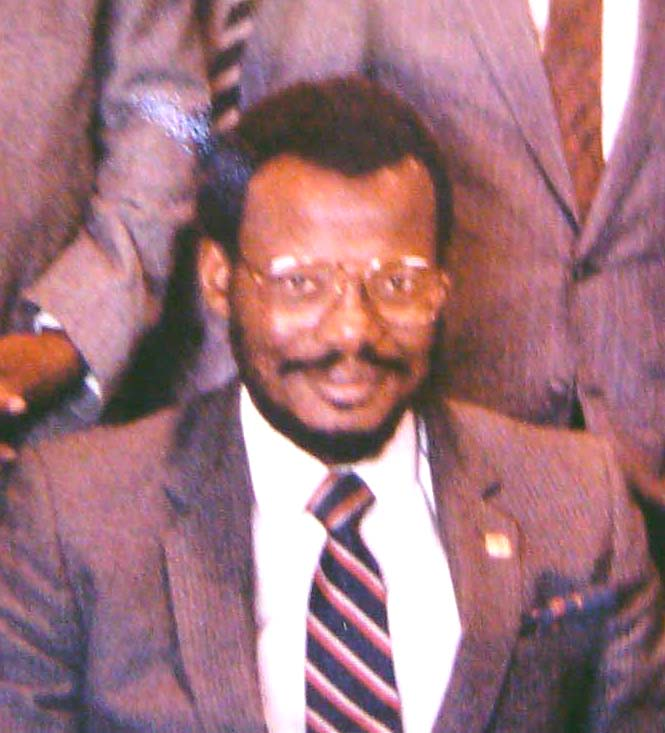 Mangosuthu Buthelezi.